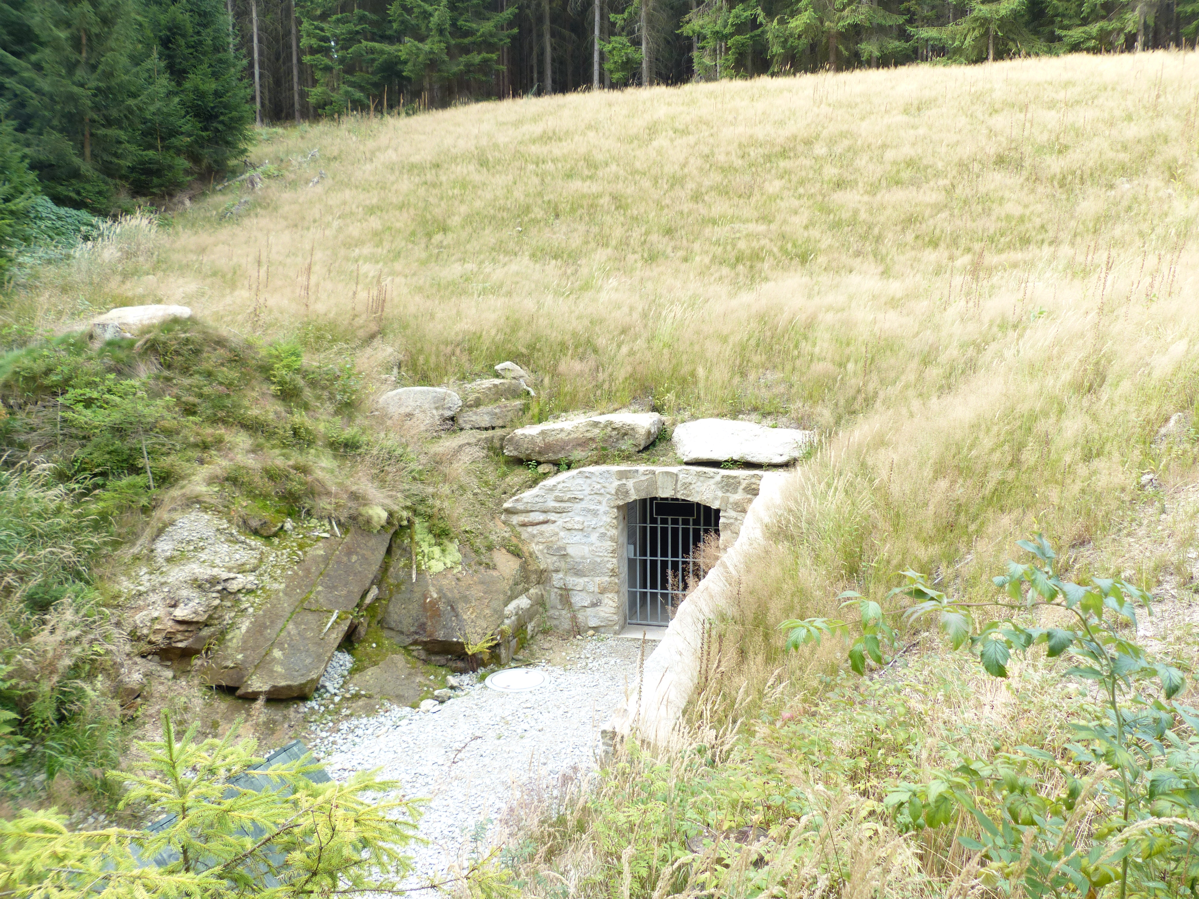 Außengelände Uranbergwerk Weißenstadt